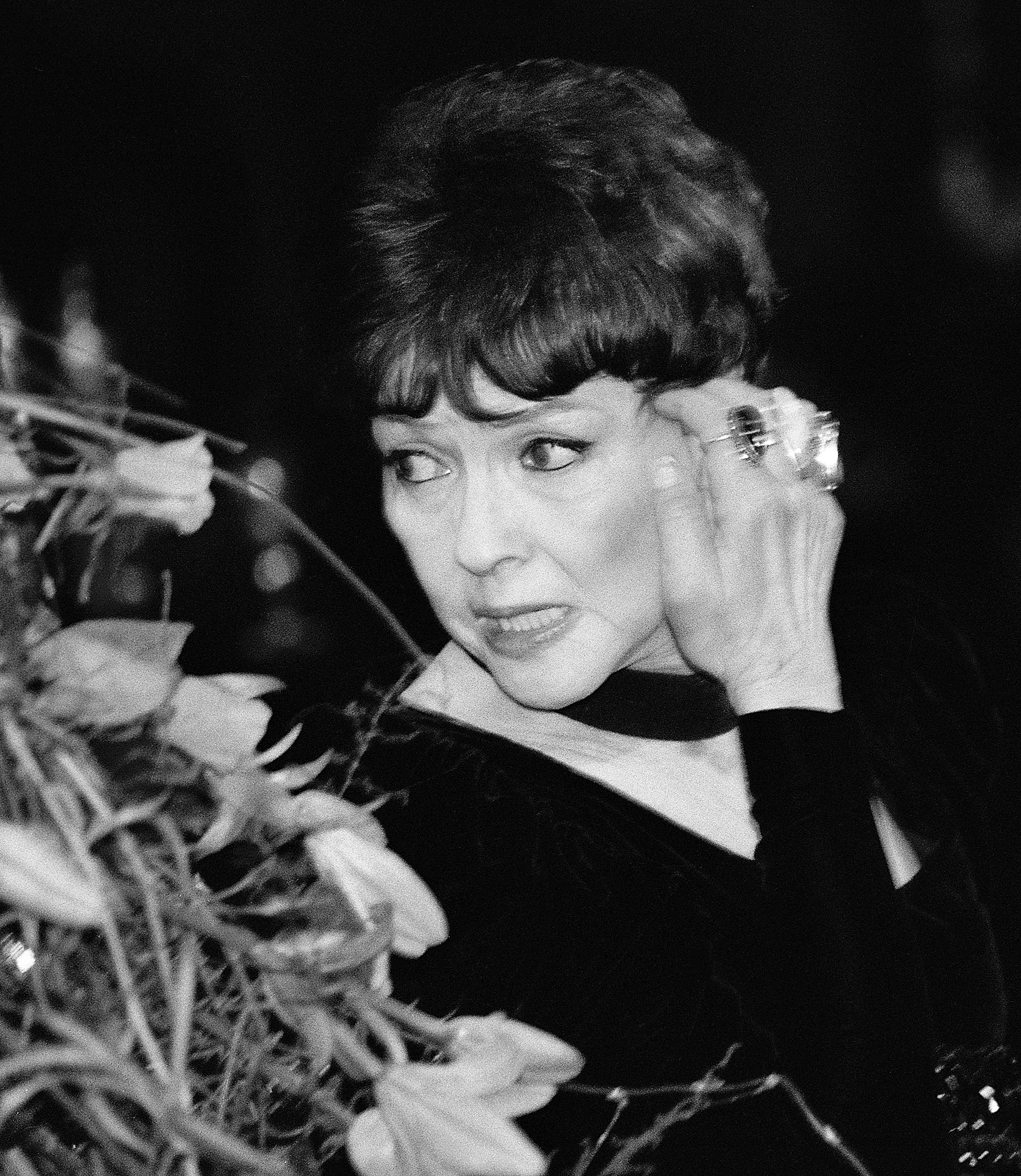 Белла Ахмадулина